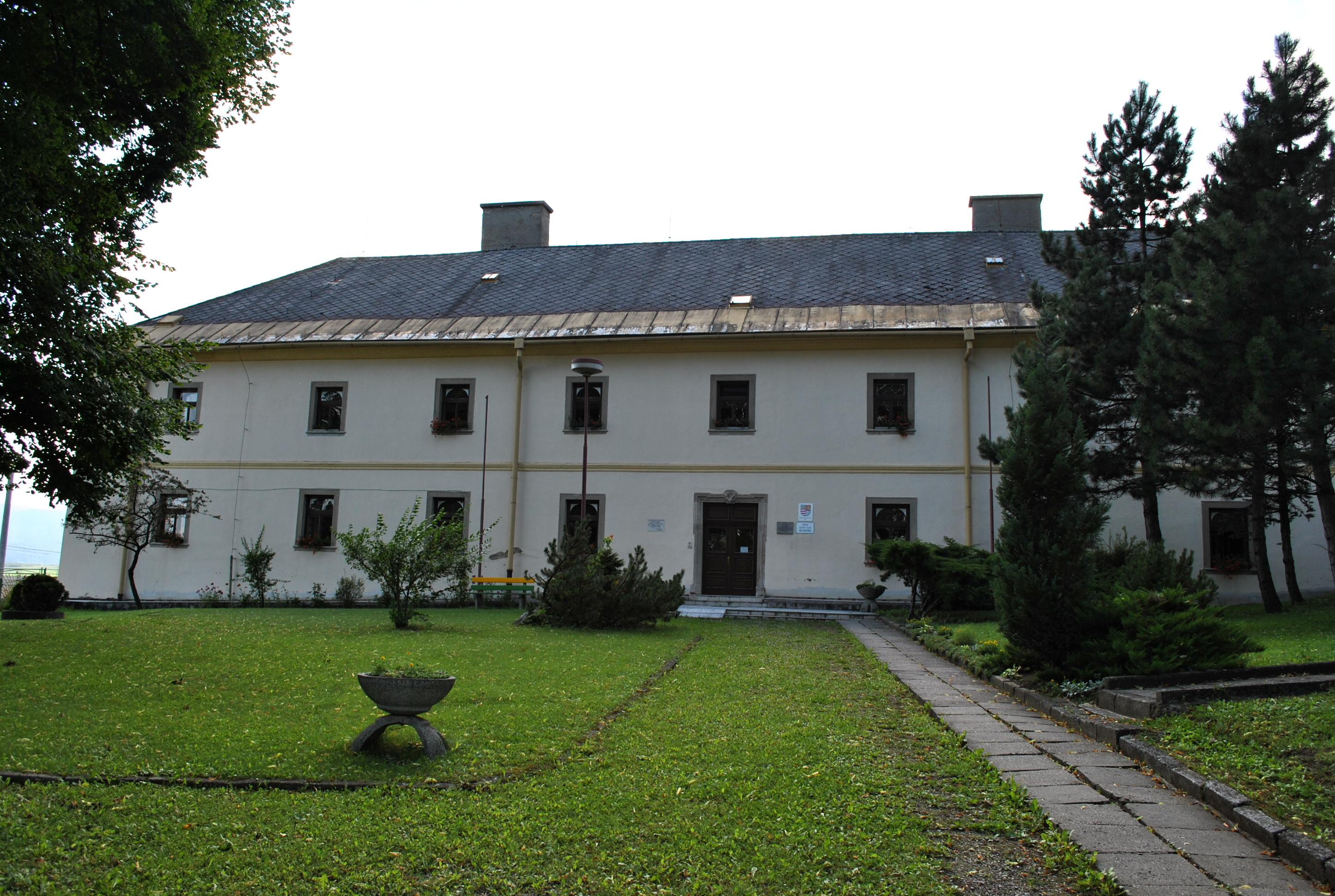 Kláštor minoritov